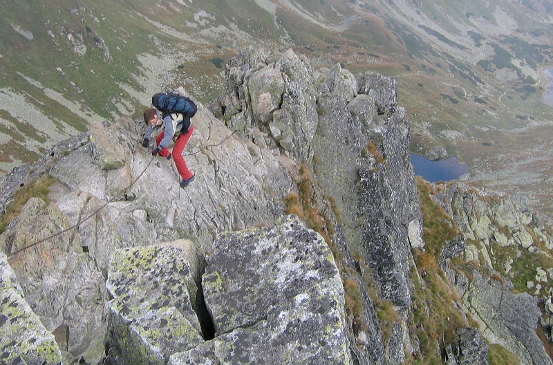 Przejście Rohackiego Konia.